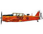 North American T-6 Texan